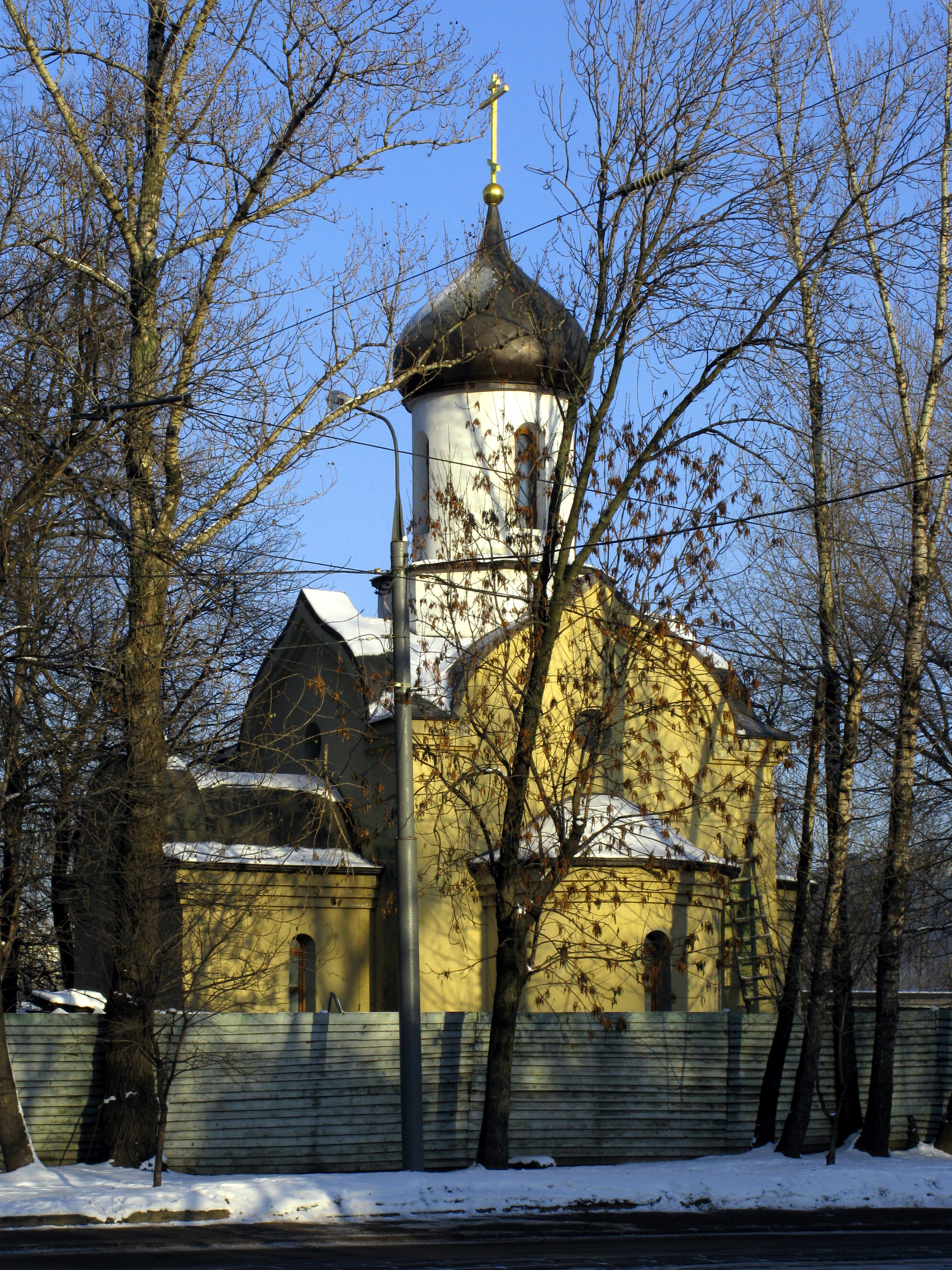 Часовня Димитрия Донского. Построена в 2005 году на месте бывшего братского кладбища Спасо-Андронникова монастыря. Приписана к Андронникову монастырю.